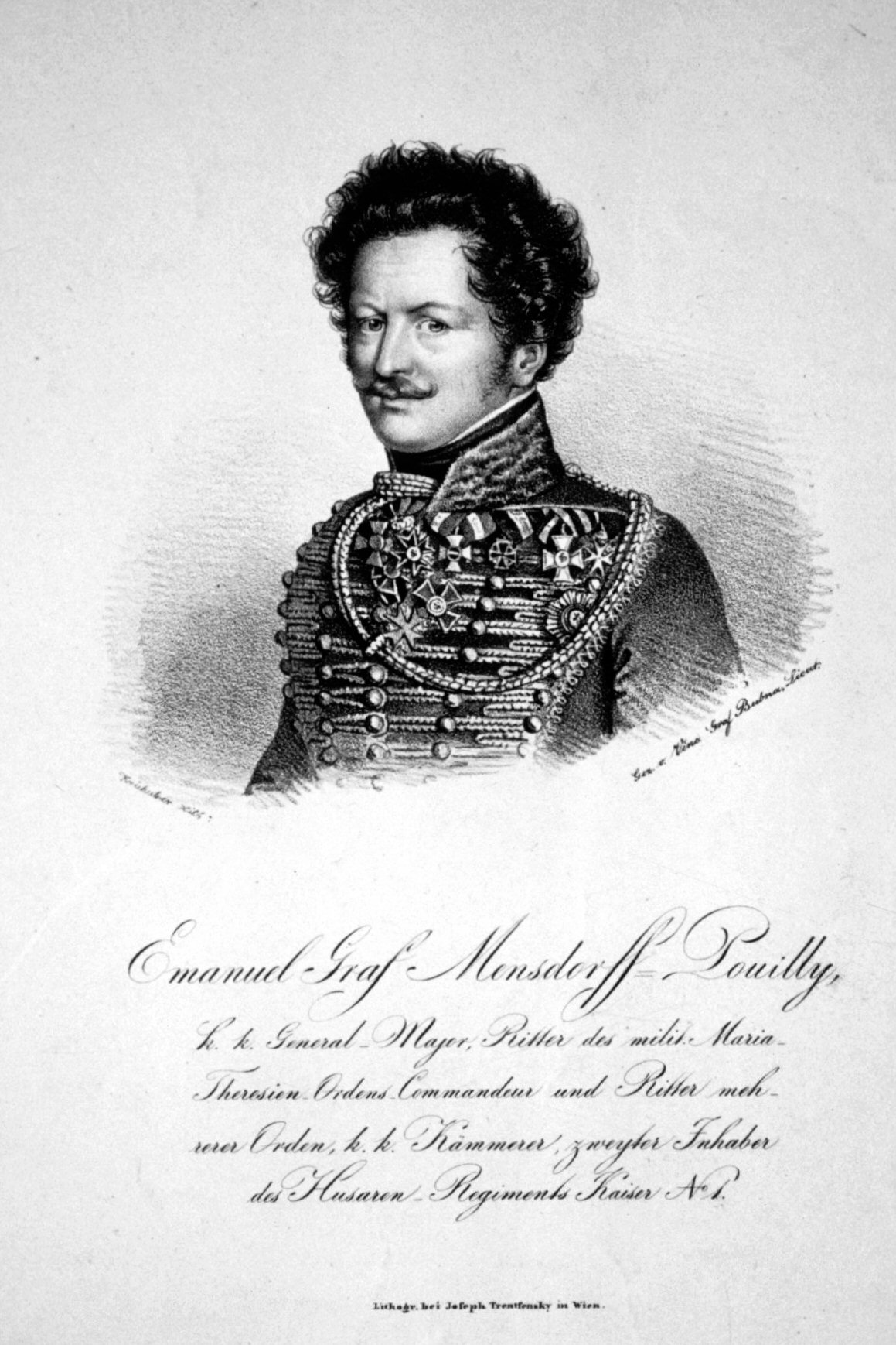 Emanuel Graf Mensdorff-Pouilly (1777-1852), k. k. Feldmarschallleutnant, Ritter des Maria-Theresien Ordens. Lithographie von Josef Kriehuber, um 1830. Nach einer Zeichnung von Vinc. Graf Bubna.